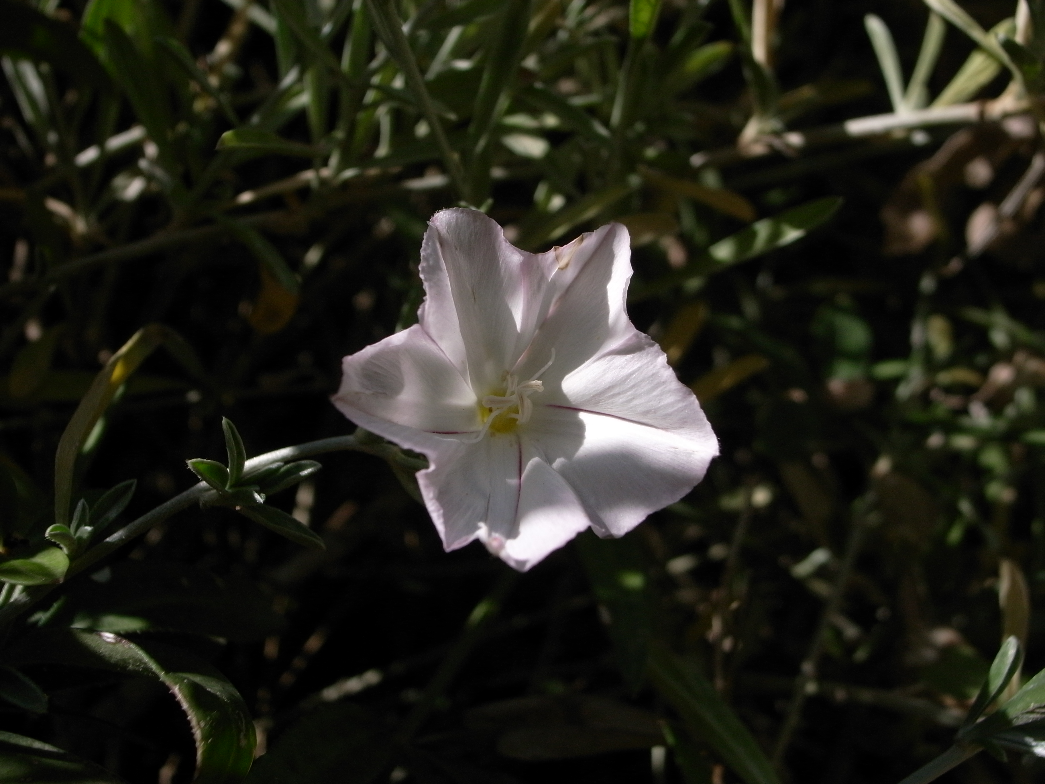 Convolvulus oleifolius, Ghajn Tuffieha, Malta